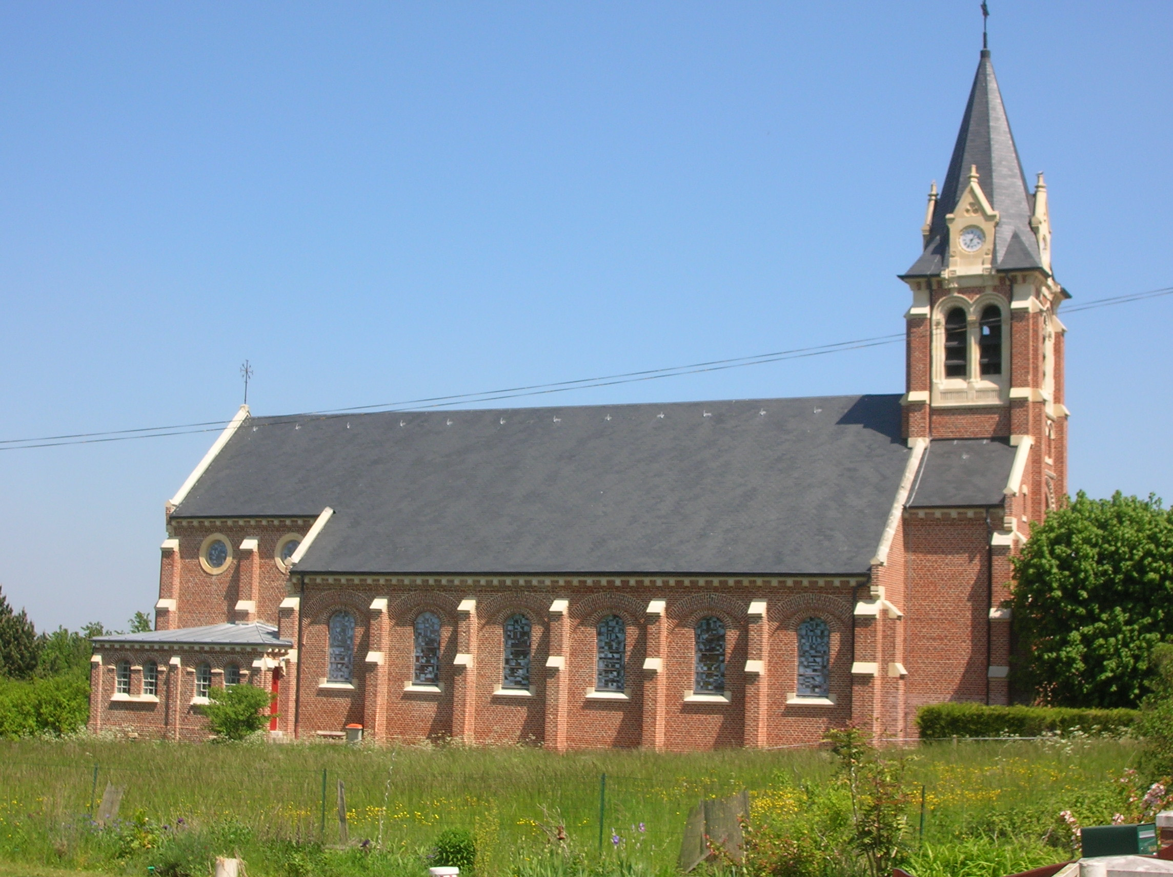 église de Saint-Fuscien